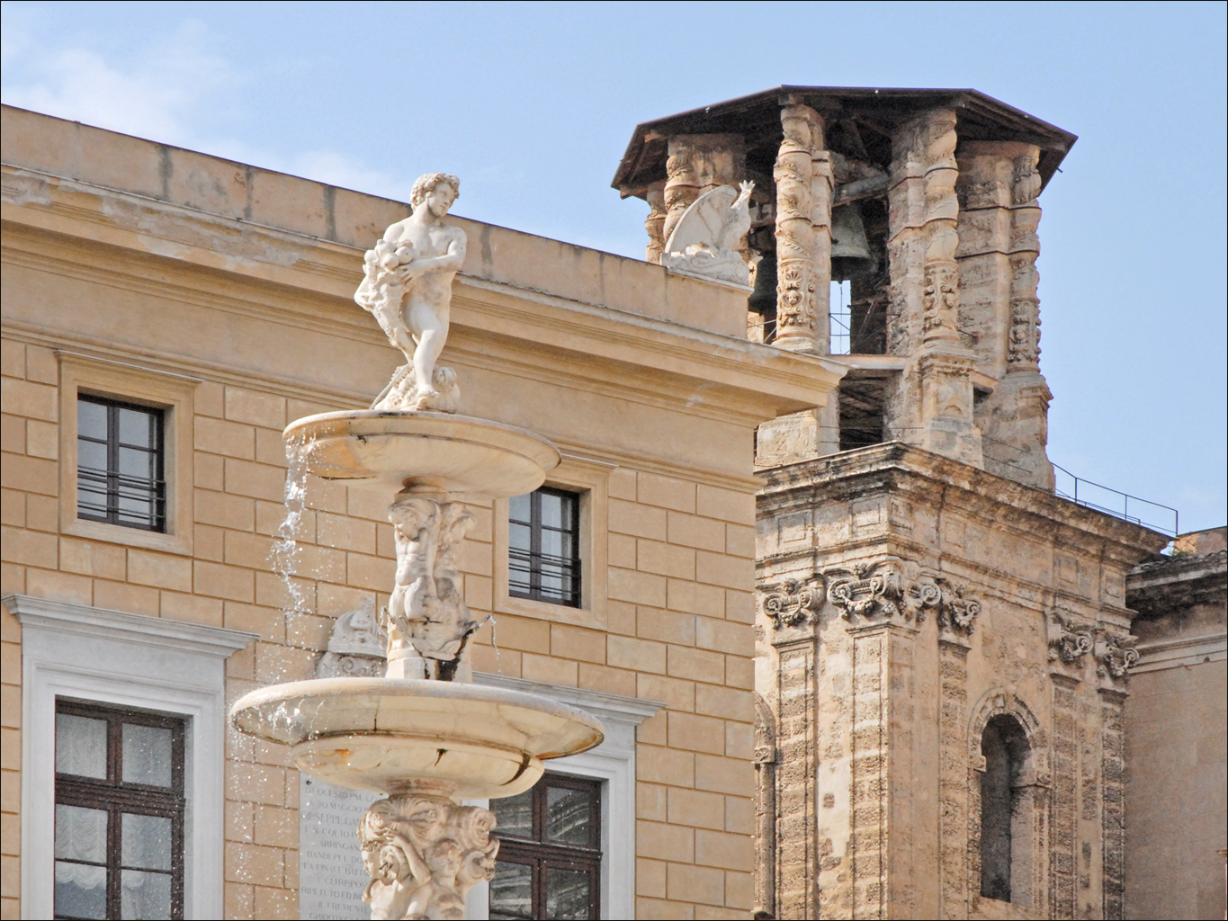 Au centre, les vasques centrales de la fontaine Au centre de la Piazza Pretoria se trouve la Fontana Pretoria, réalisée par Francesco Camilliani et Michelangelo Naccherino, au XVIe siècle, en 1554. En raison de la nudité de ses statues de marbre représentant des divinités marines et animales (les 4 fleuves de Palerme), les habitants l’ont surnommée la « Fontana delle Vergogne » (Fontaine de la honte). De nombreux sexes et nez ont été amputés par des opposants à cette nudité. Le Palazzo delle Aquile (palais des aigles), siège de la municipalité est le bâtiment le plus important de la place Pretoria. . Article de Wikipedia sur la fontaine Pretoria